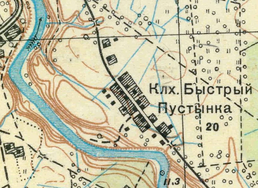 Топографическая карта Ленинградской области, квадрат О-36-14-В-а (п. Ульяновка), деревня Пустынька.